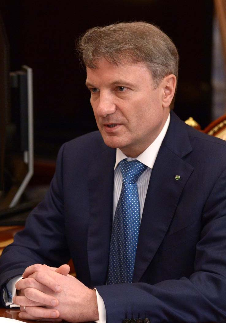 Президент, председатель правления Сбербанка России Герман Греф